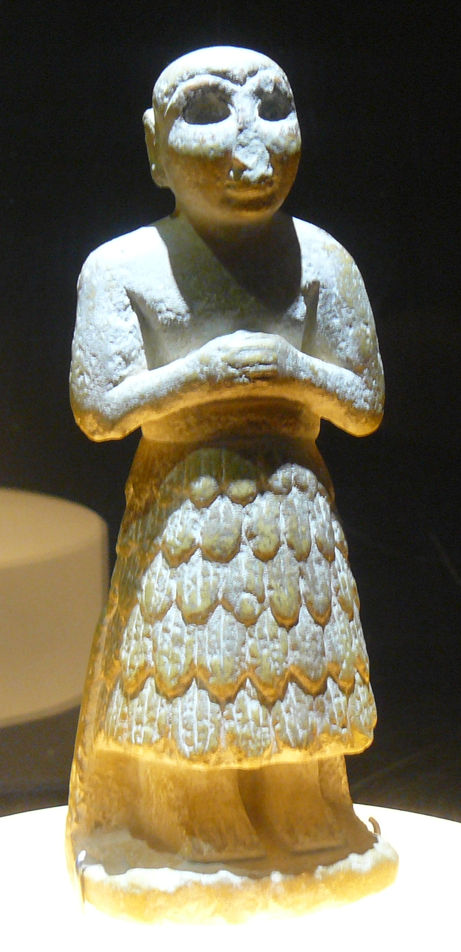 Sacerdote Sumerio (statuette?)